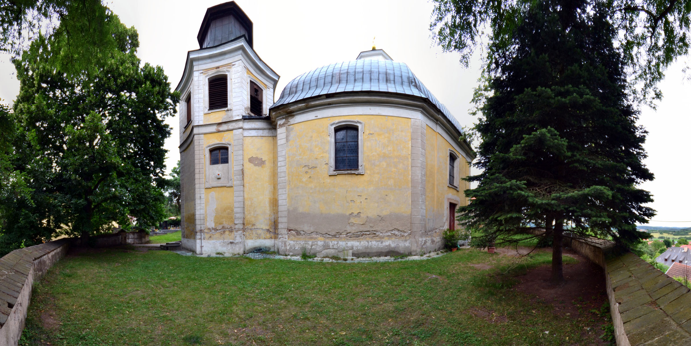 Kostel sv. Petra a Pavla, Slapy, okres Praha-západ.